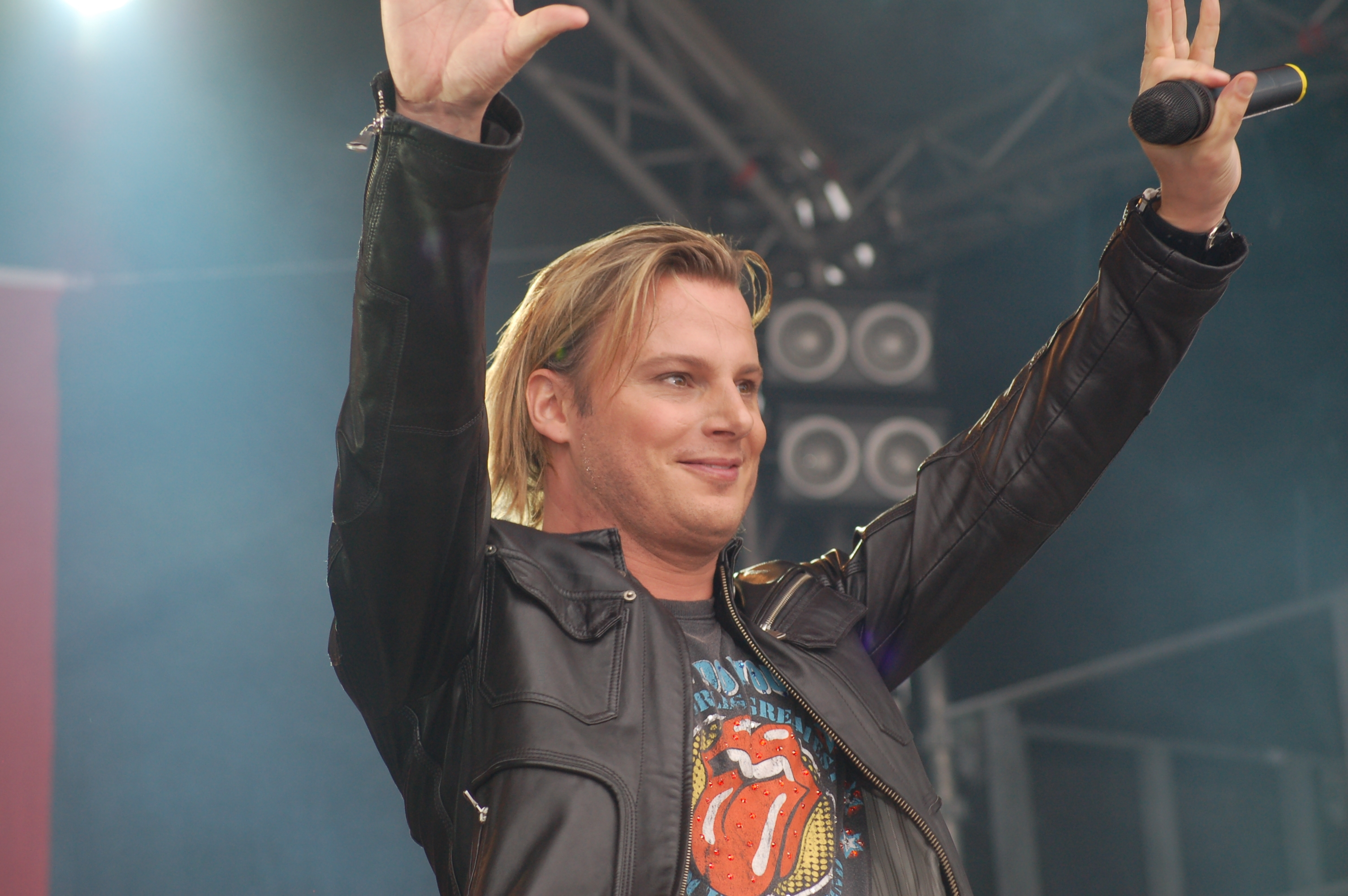 Magus Carlsson i Norrköping.